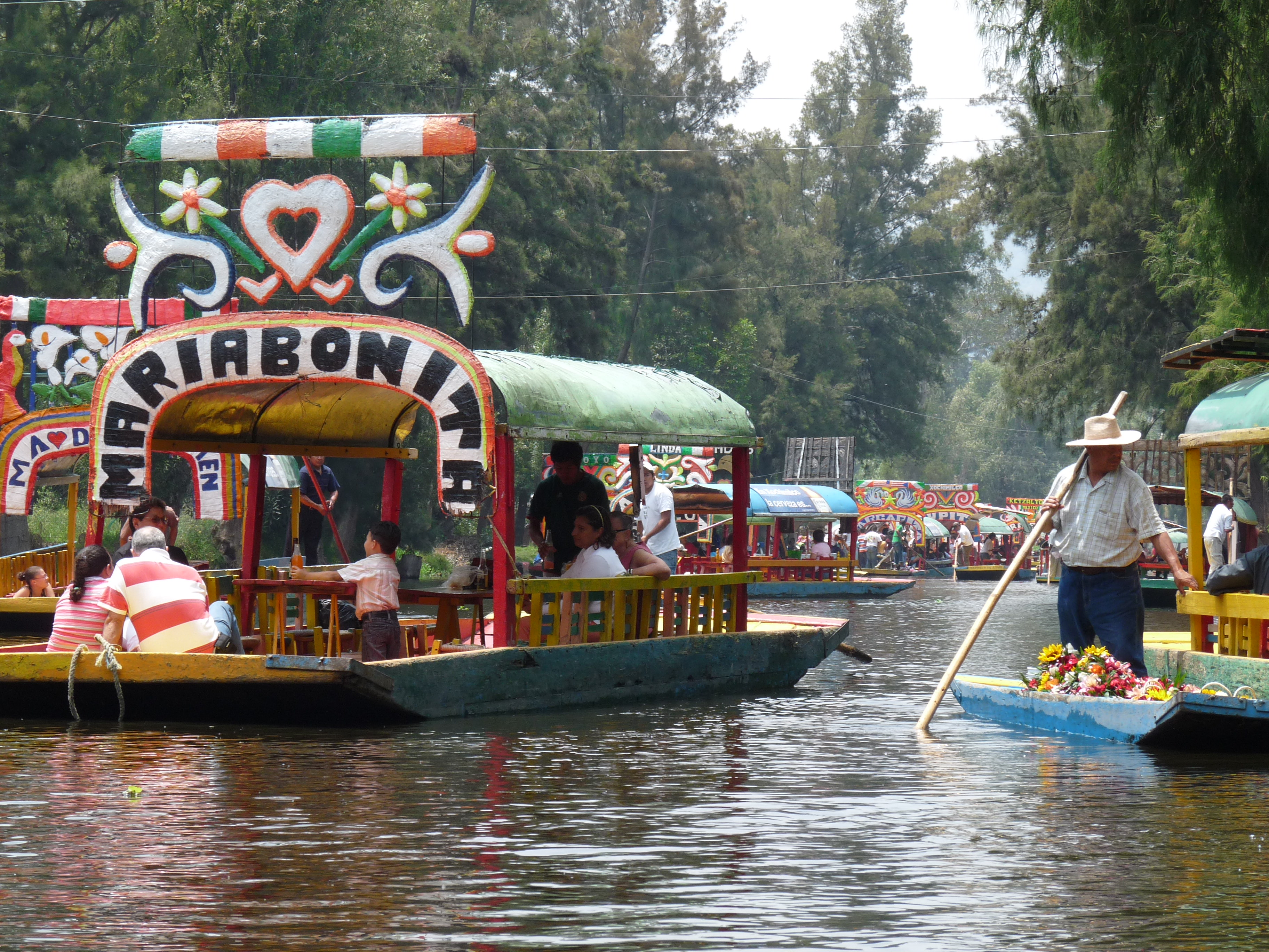 Trajineras à Xochimilco en 2009.